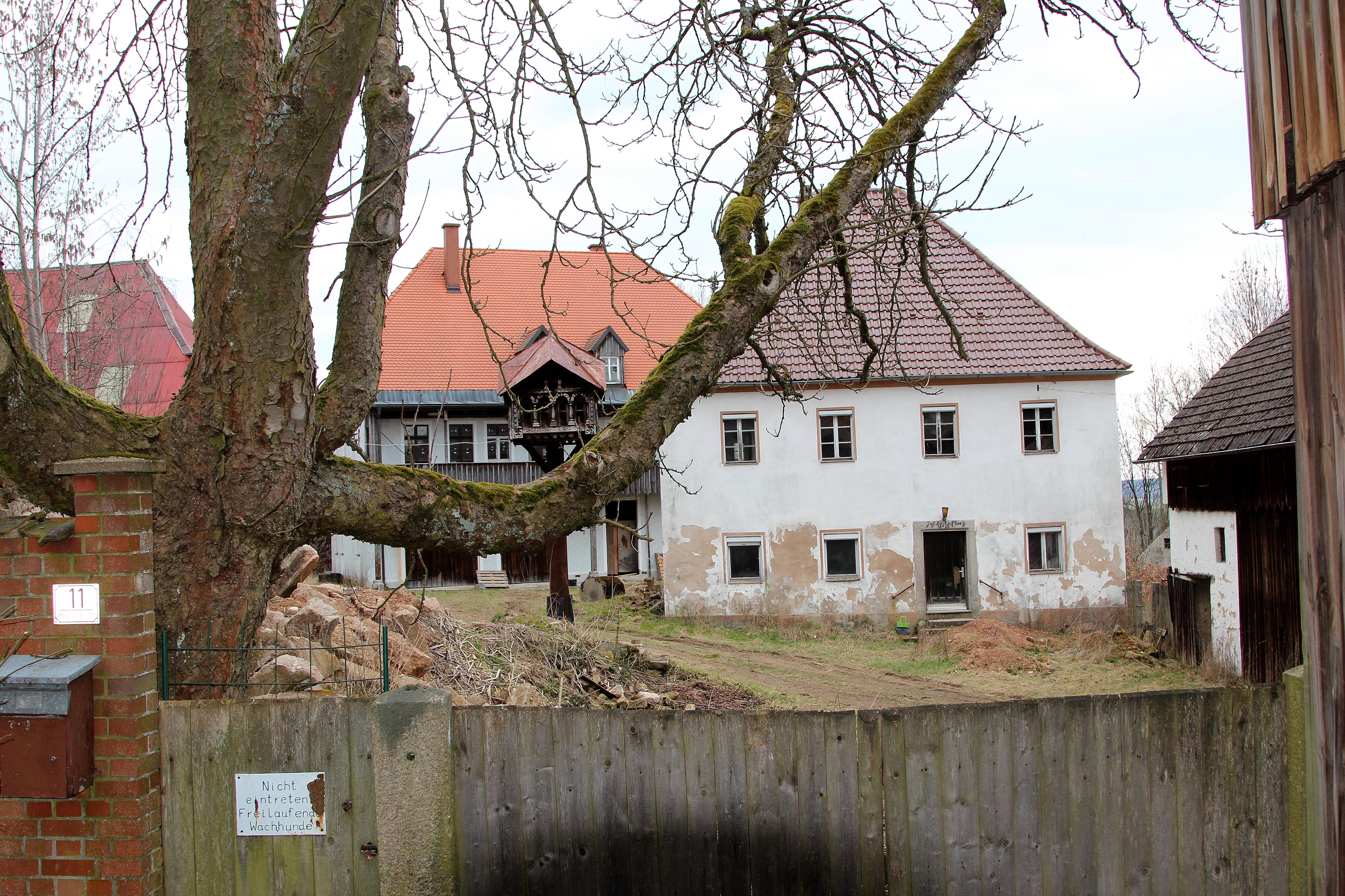 Roggenstein, Muglhoferstr. 11, Schlösschen, Anfang 19. Jahrhundert, Walmdachbau; ehemalige Feste, sog. Altes Schloss, mittelalterlich, Mauerreste und Keller; ehemaliges Bräuhaus, 1720, im Kern älter, zweiflügeliger Krüppelwalmdachbau; Taubenkobel, um 1900; Stadt Vohenstrauß, Landkreis Neustadt an der Waldnaab, Oberpfalz, Bayern